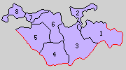 山口県大津郡の町村制時点の町村。